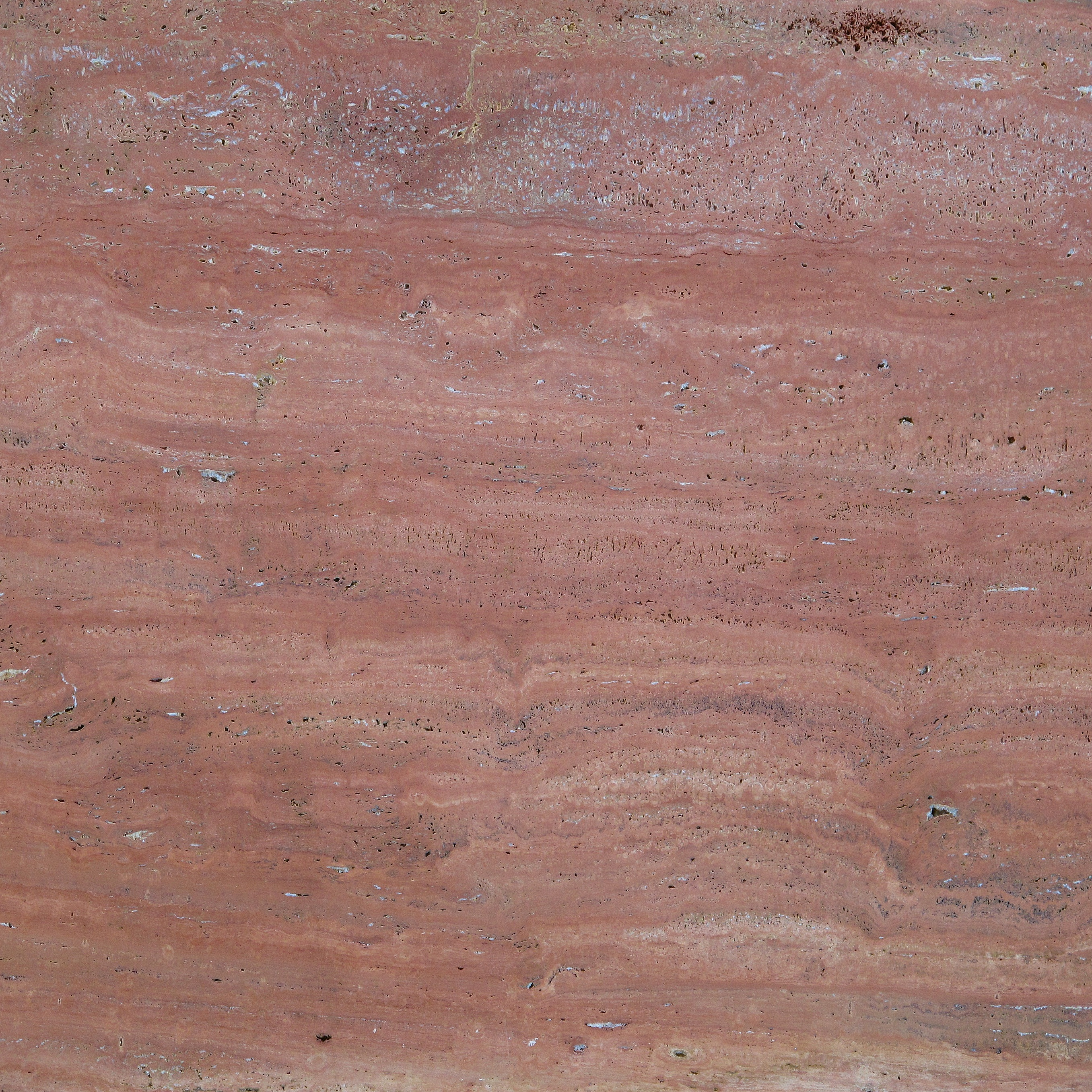 Persischer Travertin (Fassadendetail am Staatsarchiv Bremen); der Ausschnitt hat eine Kantenlänge von ca. 70 cm. Das Staatsarchiv ist ein geschütztes Kulturdenkmal in der Freien Hansestadt Bremen, mit der Nr. 1772 beim Landesamt für Denkmalpflege registriert.